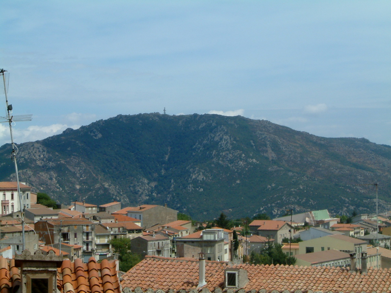 OTRS #2006111110010445 Vi chiedo di poter pubblicare nella voce "pattada" la foto che vi mando in allegato. La foto è stata scattata da me e viene concessa in licenza di pubblico dominio. Gian Mario Manca thumb|La tipica "sa Resolza" di Pattada